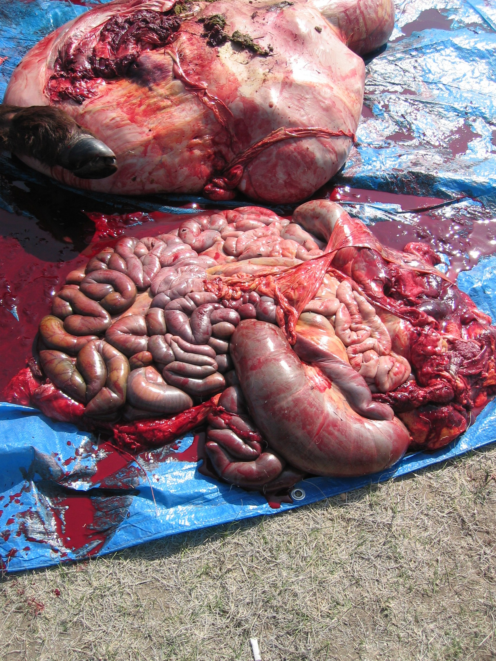 Dépeçage d’un bison pour les enfants du collège de Wanbli, Pine Ridge, South-Dakota, USA L'estomac et les intestins vont etre préparés pour la soupe, le foie a été mangé cru